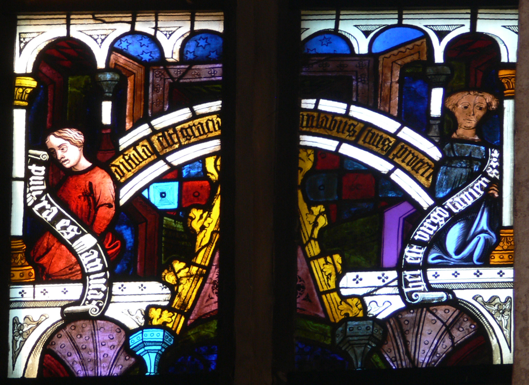 Glasfenster im Chor der Kath. Pfarrkirche Unserer Lieben Frau, Eriskirch Rechtes Chorfenster (Chor süd II; Kreuzlegendenfenster), 4. Zeile von unten: Gehäusearchitektur mit Halbfiguren; um 1410–1430 rechts wohl die Königin von Saba, links vermutlich König Salomon (nach Rüdiger Becksmann) links: Pulch(ra) es amica (Hoheslied 6,3); rechts: h(a)ec est virgo sapiens; auf dem Bogen: dif(f)usa est gracia in labis tuis pro(p)ter(ea) (Psalm 44 [45],3)